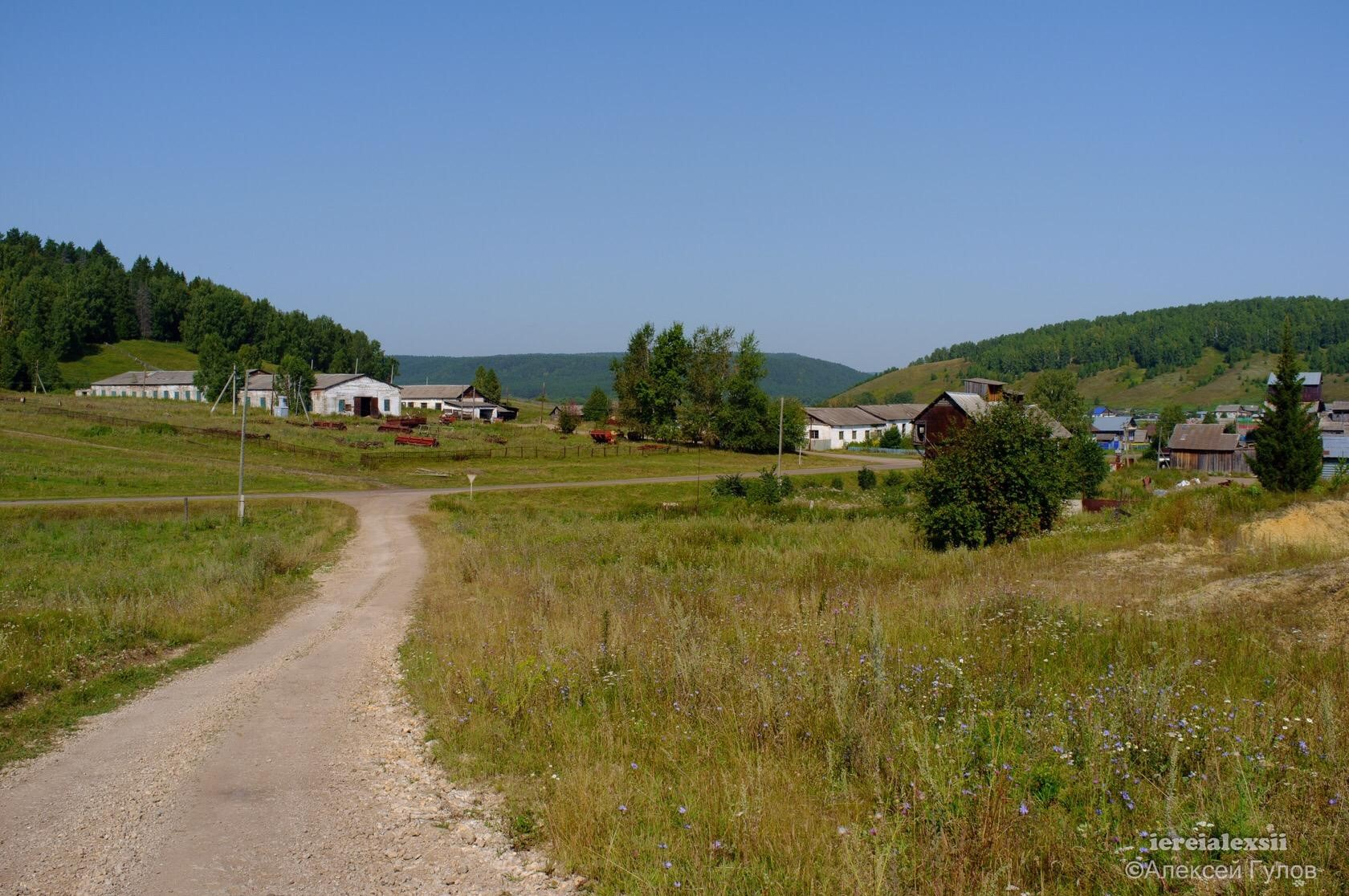 метели